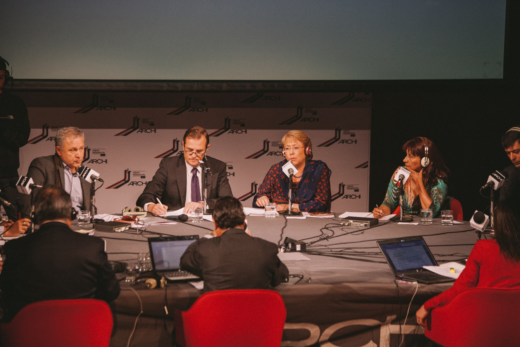 Debate presidencial ARCHI 2013.